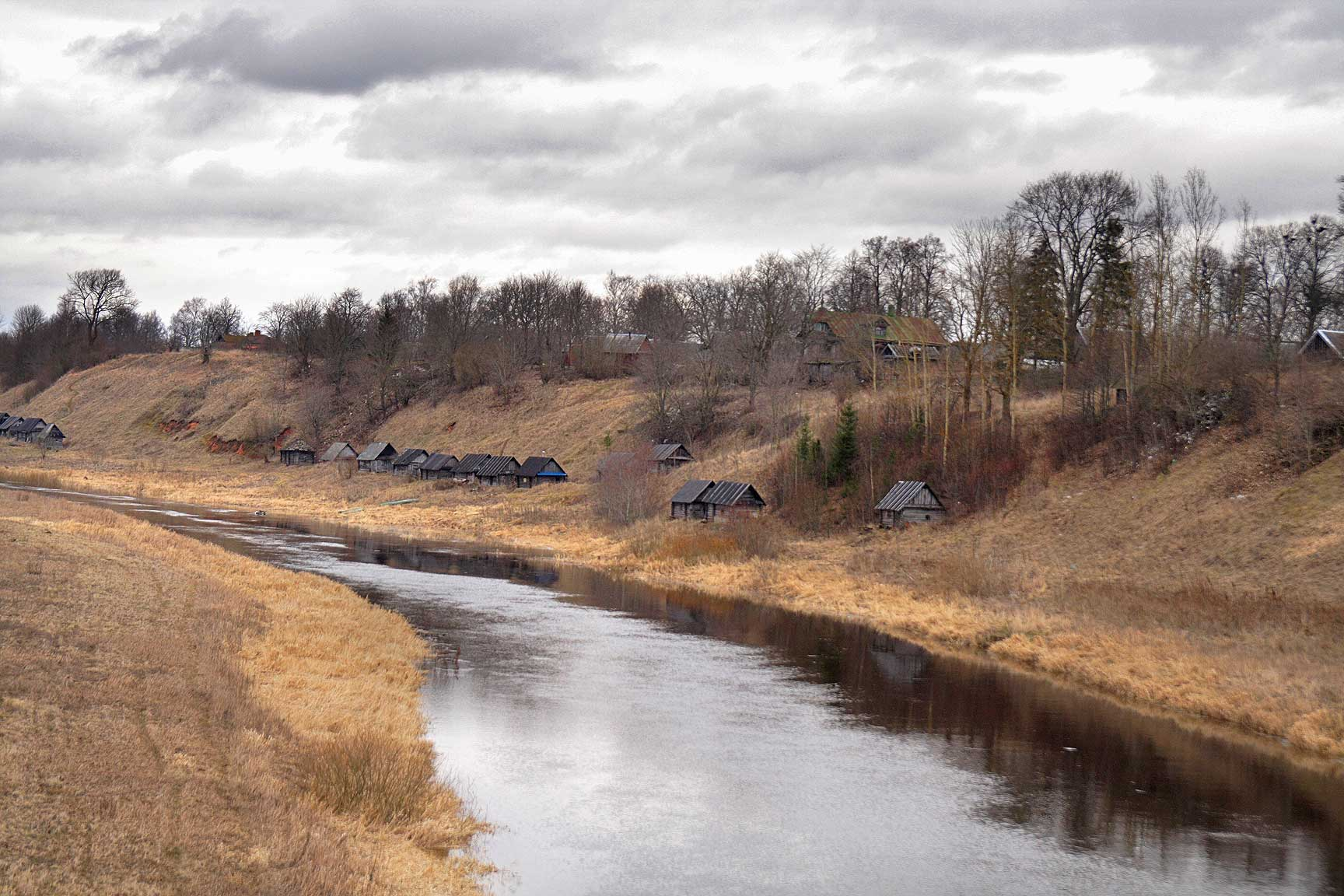 Деревня Усадище. Village Usadische.